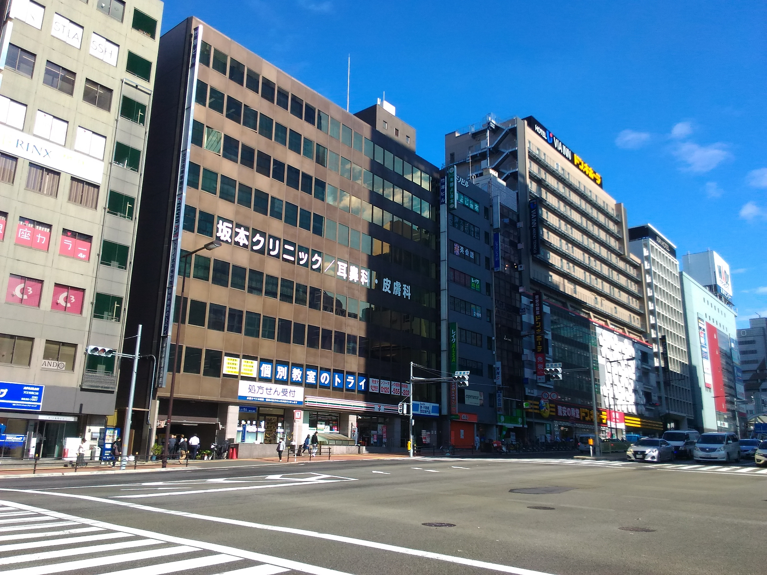 旭町（大阪）1丁目付近の写真